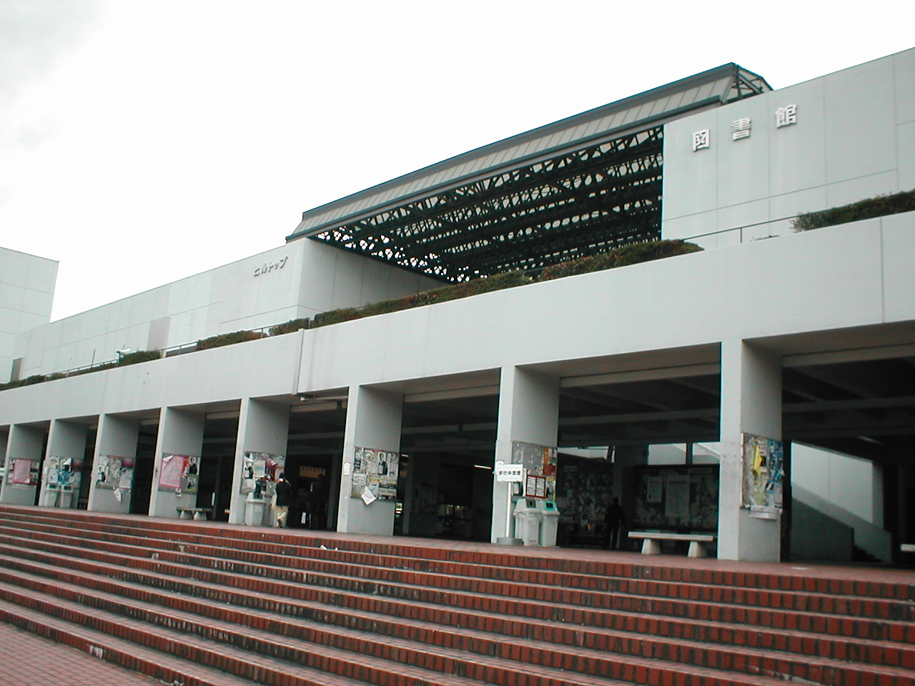 ファイルの概要 中央大学八王子キャンパス図書館